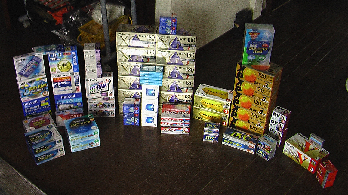 投稿者自身が買い置きしている市販の記録媒体を撮影。 （写真に写っているのは、すべて日本国内で発売されている製品です。）